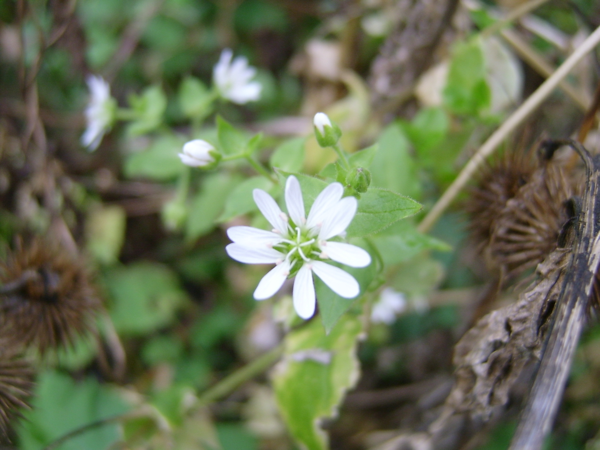 Łąki na Notecią, gmina Santok, powiat gorzowski, woj. lubuskie, Poland